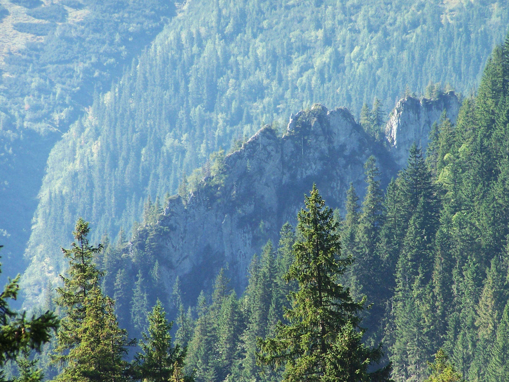 Smytniańskie Turnie (Dolina Kościeliska, West Tatra Mountains)